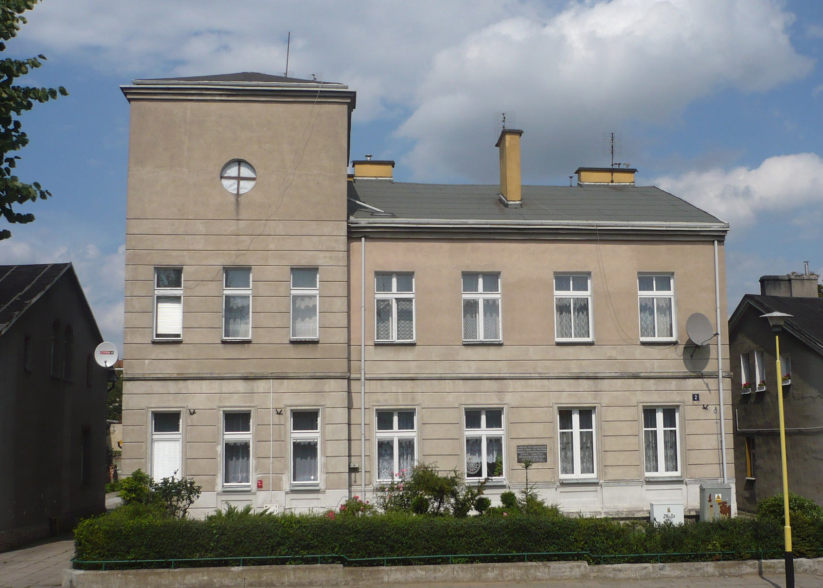 Gryfice, ul. Ks. Stanisława Ruta 2 - dom, kon. XIX